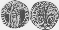 «Florín de Aragón» de Pedro IV el Ceremonioso. Pieza de Oro de aprox. 3,42 gr. y ley de 18 quilates. Valor de 11 sueldos aragoneses.